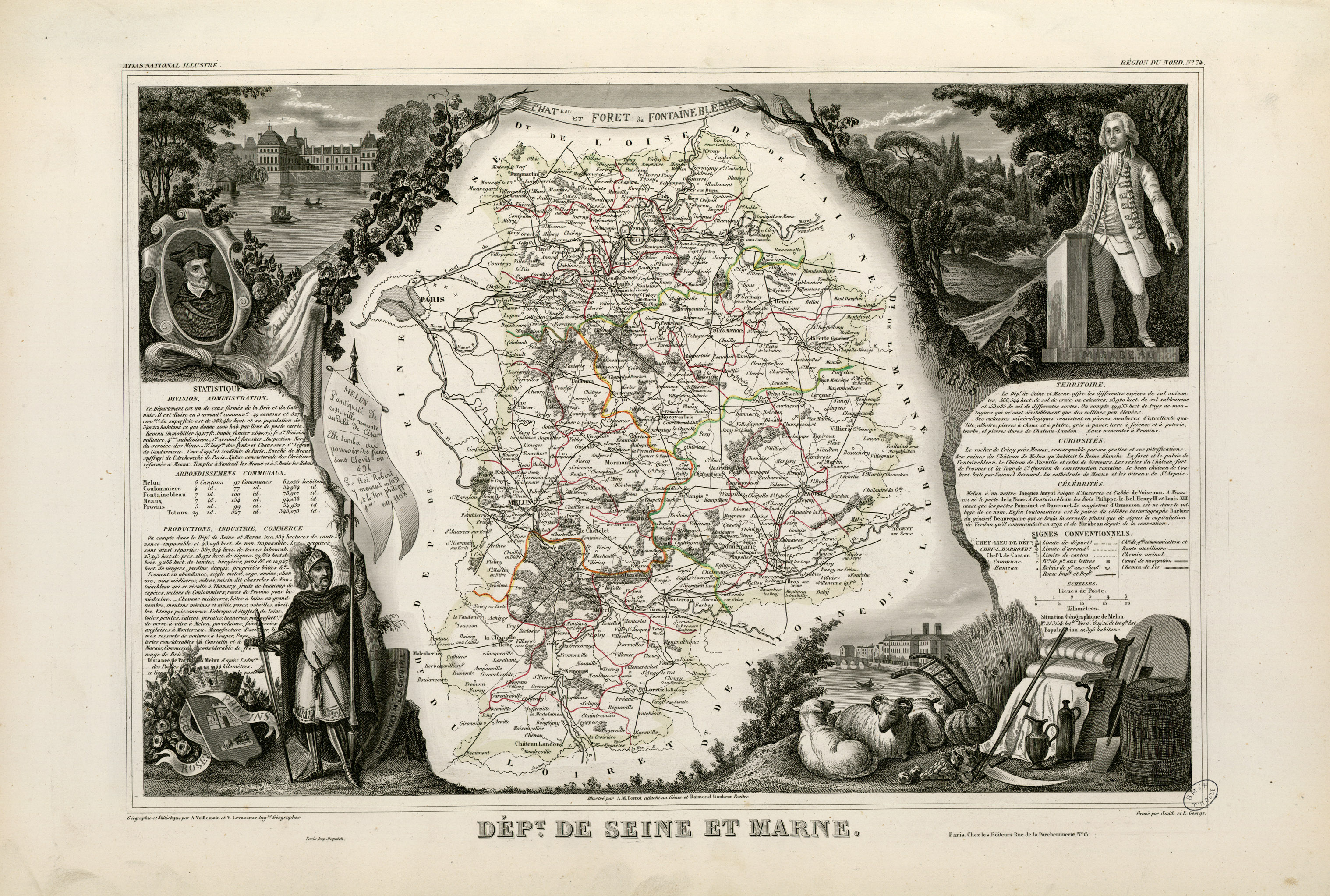 Titre complet du recueil : Atlas national illustré des 86 Départements et des Possessions de la France divisé par Arrondissements, Cantons et Communes avec le tracé de toutes les routes, chemins de fer et canaux. Dressé d'après les Travaux du Cadastre du Dépôt de la Guerre et des Ponts et Chaussées par V. Levasseur, Ingénieur Géographe attaché au Génie du Cadastre et de la Ville de Paris. Gravé sur acier par les meilleurs artistes. Imprimerie de Lemercier à Paris ou imprimerie Dupuich à Paris. Page de titre et 100 pl. en n. et b. et en coul. dont un tableau statistique et 2 cartes dépliantes. Ancely, René (1876 - 1966). Possesseur